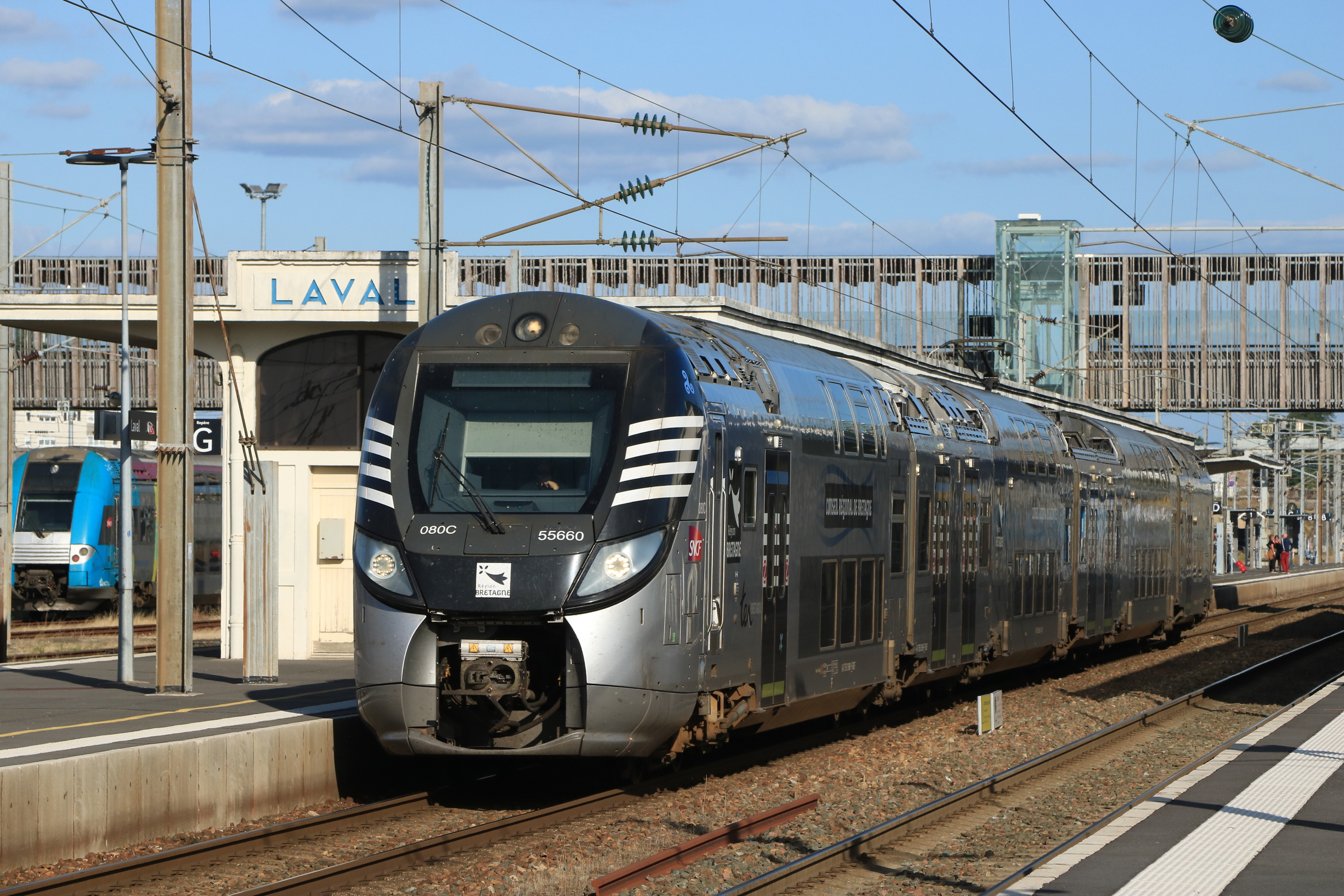 Le Regio2N n°080C (Z55659/60) assurant le TER n° 857675 (Laval 18h03 - Rennes 18h58), par de sa gare origine.